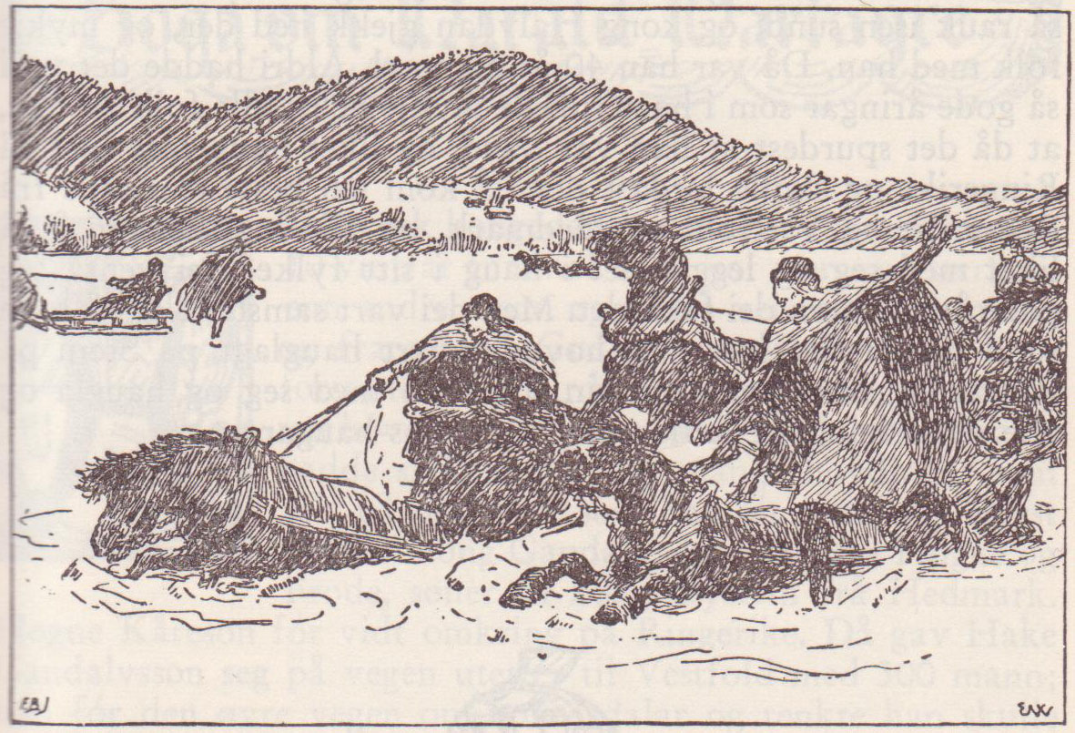 Halvdan Svarte drukner i Røykensvik